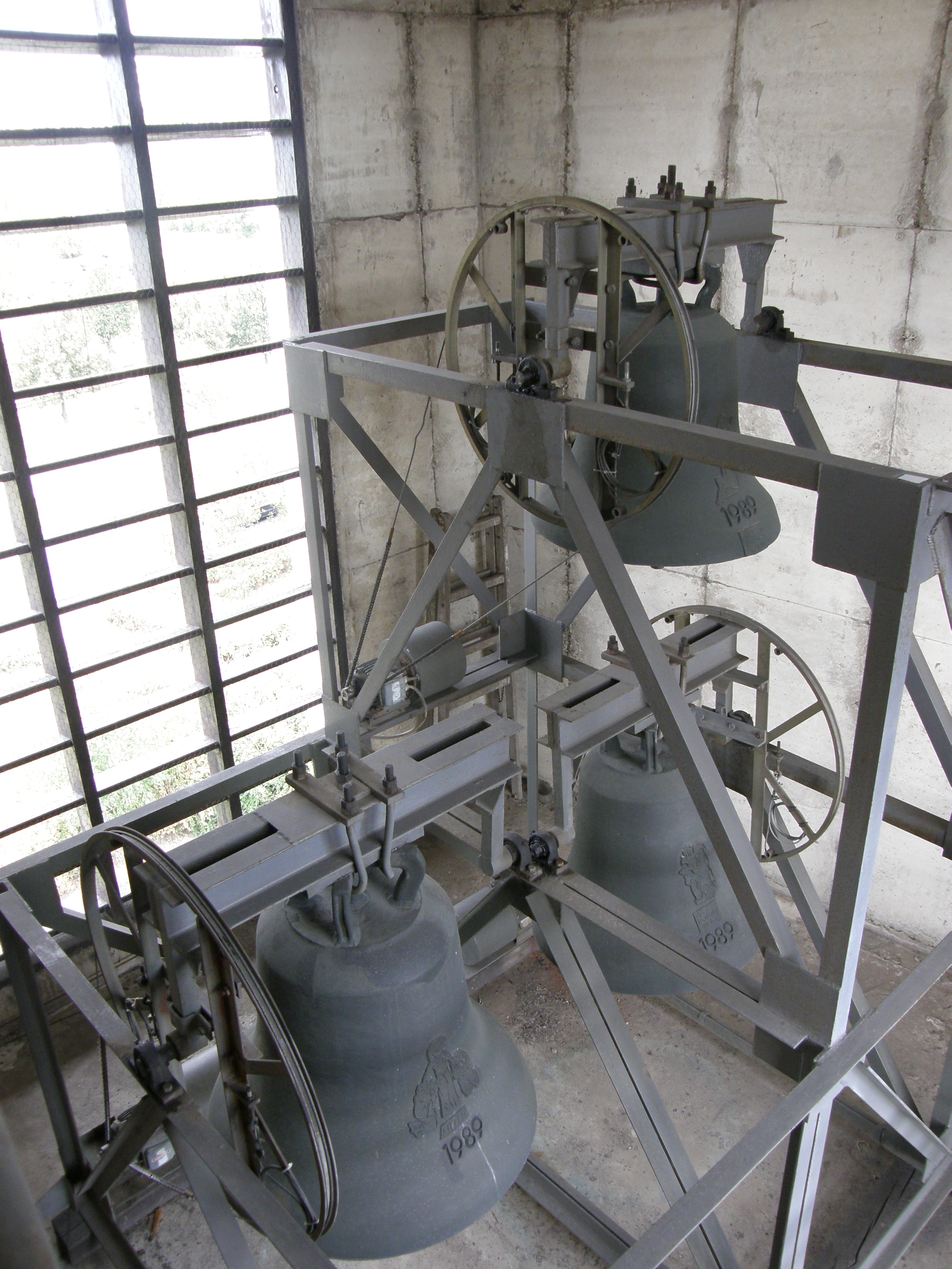 Kirche in Berlin-Marzahn: Geläut